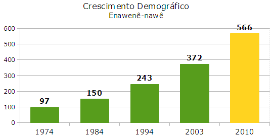 Crescimento populacional dos Enawenê-nawê, entre os anos de 1974 e 2010, em intervalos de aproximadamente dez anos. Gráfico feito com LibreOffice Calc, a partir de dados de DOS SANTOS, Gilton Mendes (1974, 1984 e 2003), CTI (1994) e FUNASA (2010).